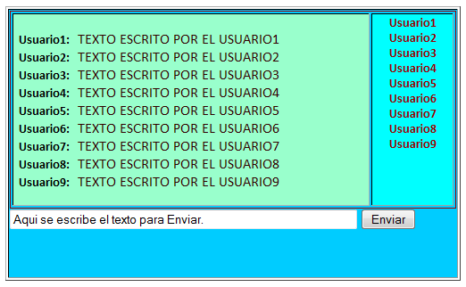 Ejemplo de un Chat Web.